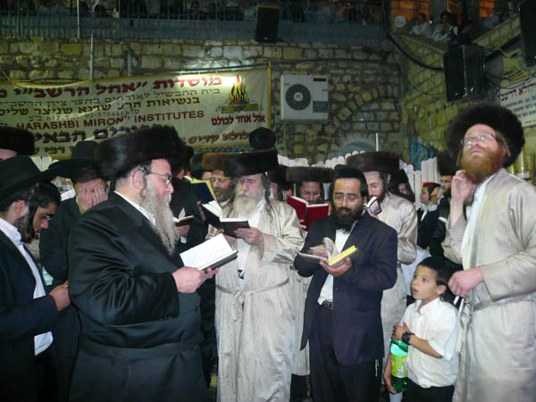 Lag ba Omer